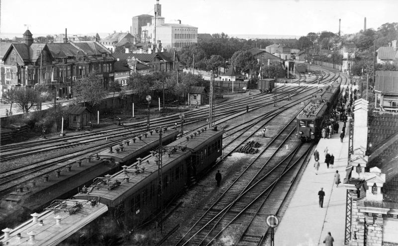 Balti jaam, vaade Balti jaamahoone katuselt Nõmme elektritrammi ooteplatvormi ümbrusele (Suurtüki tänava juures). Vasakul Kopli tänav.